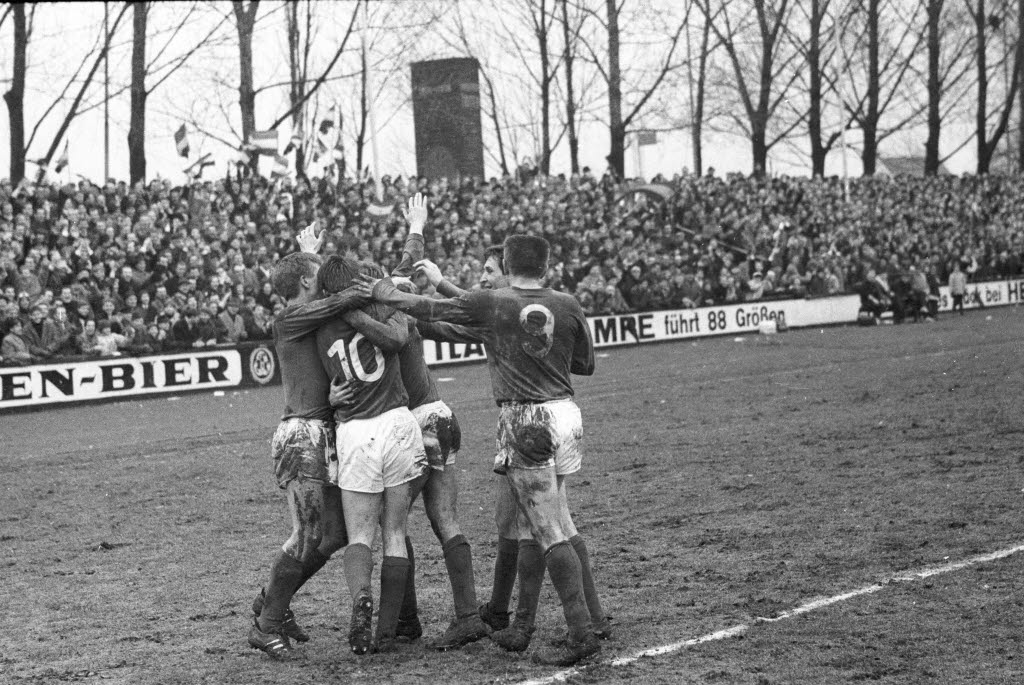 im Holsteinstadion. Im Bild Tor, 1:0 durch Schülke.